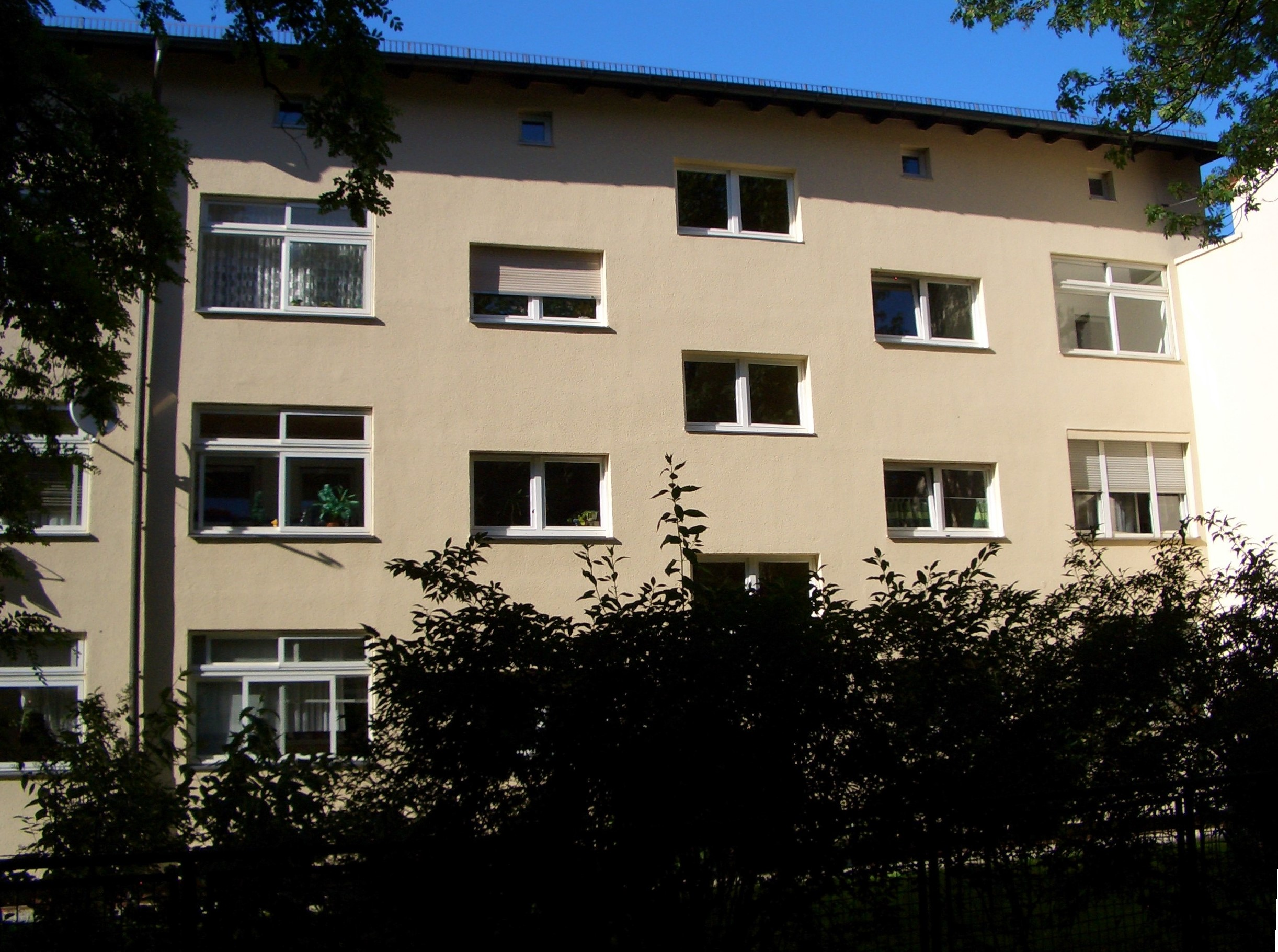 Postversuchssiedlung München-Neuhausen von Süden